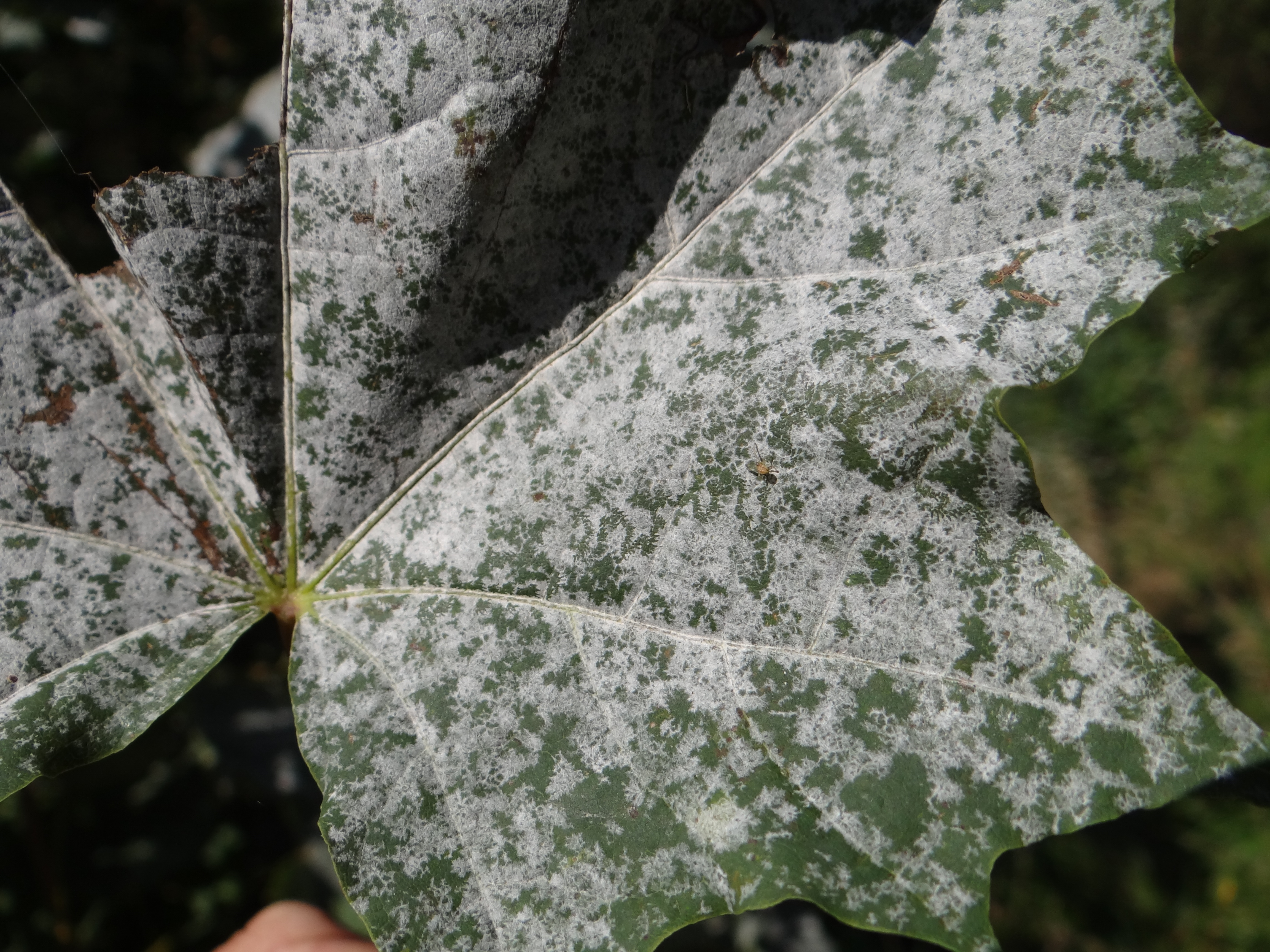 Sawadaea tulasnei on leaf Acer platanoides